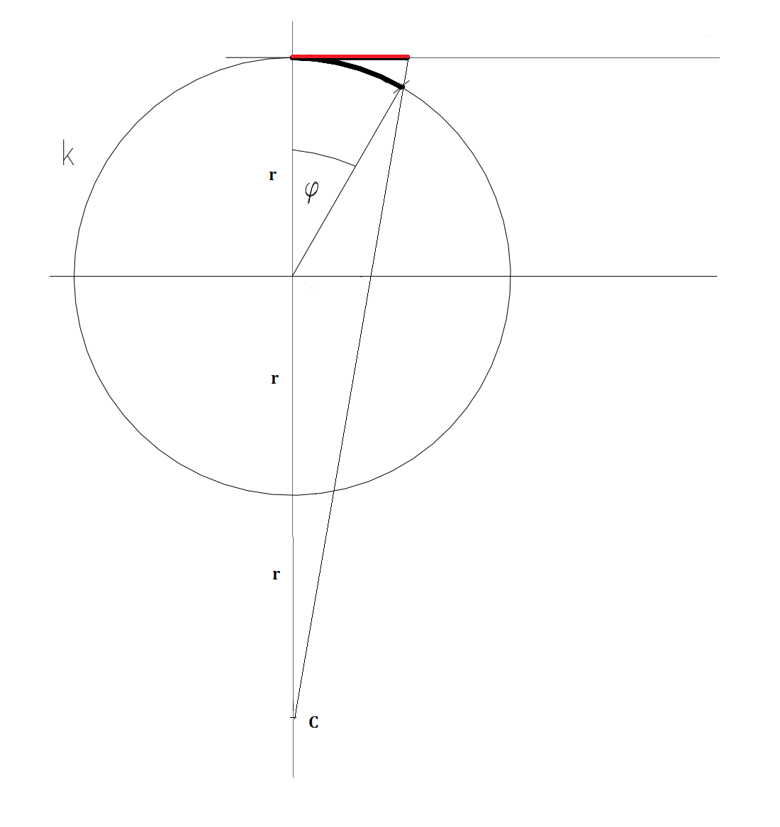 An approximation of the length of an arc/přenesení délky oblouku na úsečku